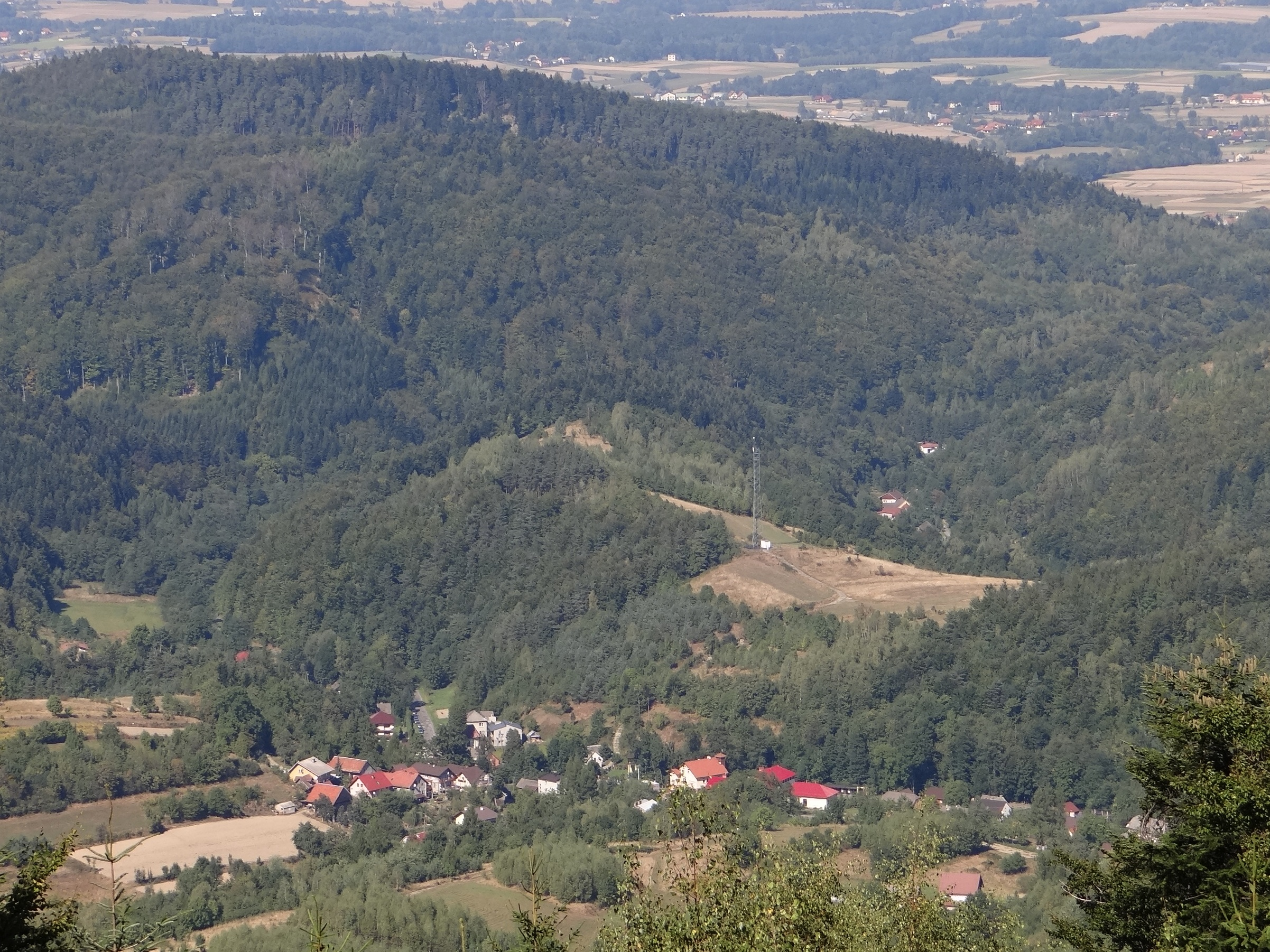 Widok z Gancarza